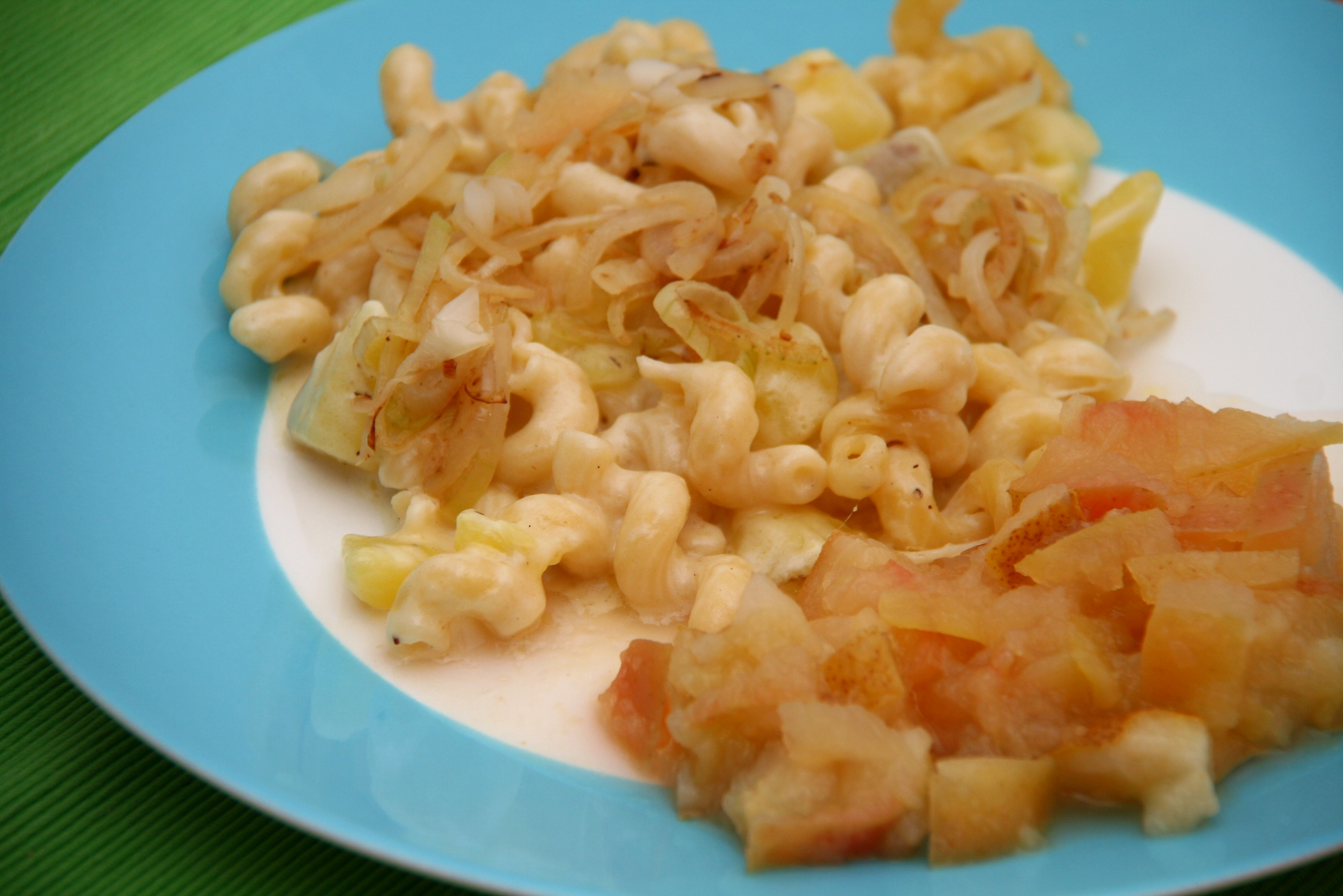 Älplermagronen mit Apfelkompott als Beilage.